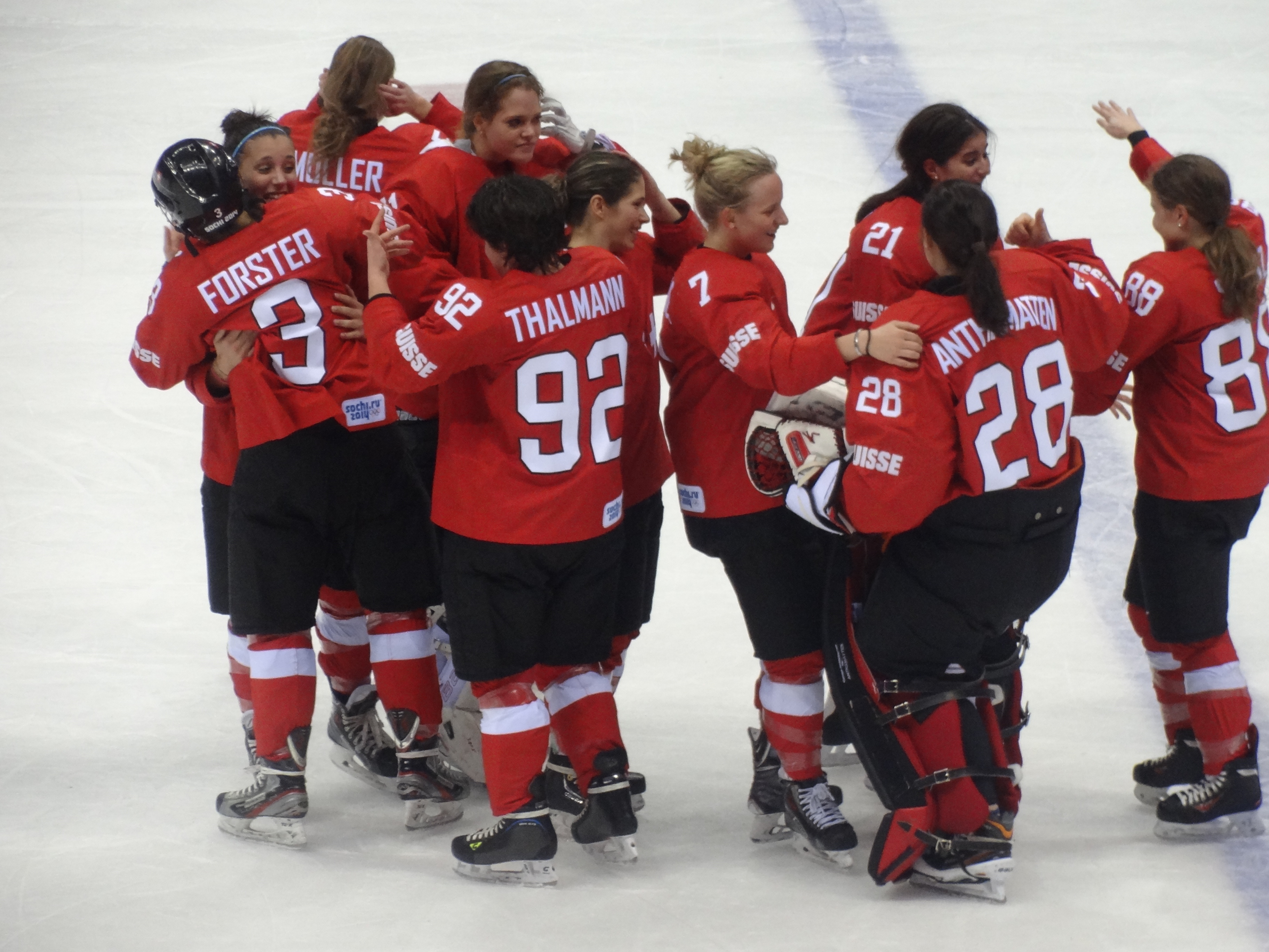 XXII Олимпийские зимние игры. Сочи, 20 февраля Хоккей. Женщины. За третье место. Швеция – Швейцария – 3:4 (1:0, 1:0, 1:4).